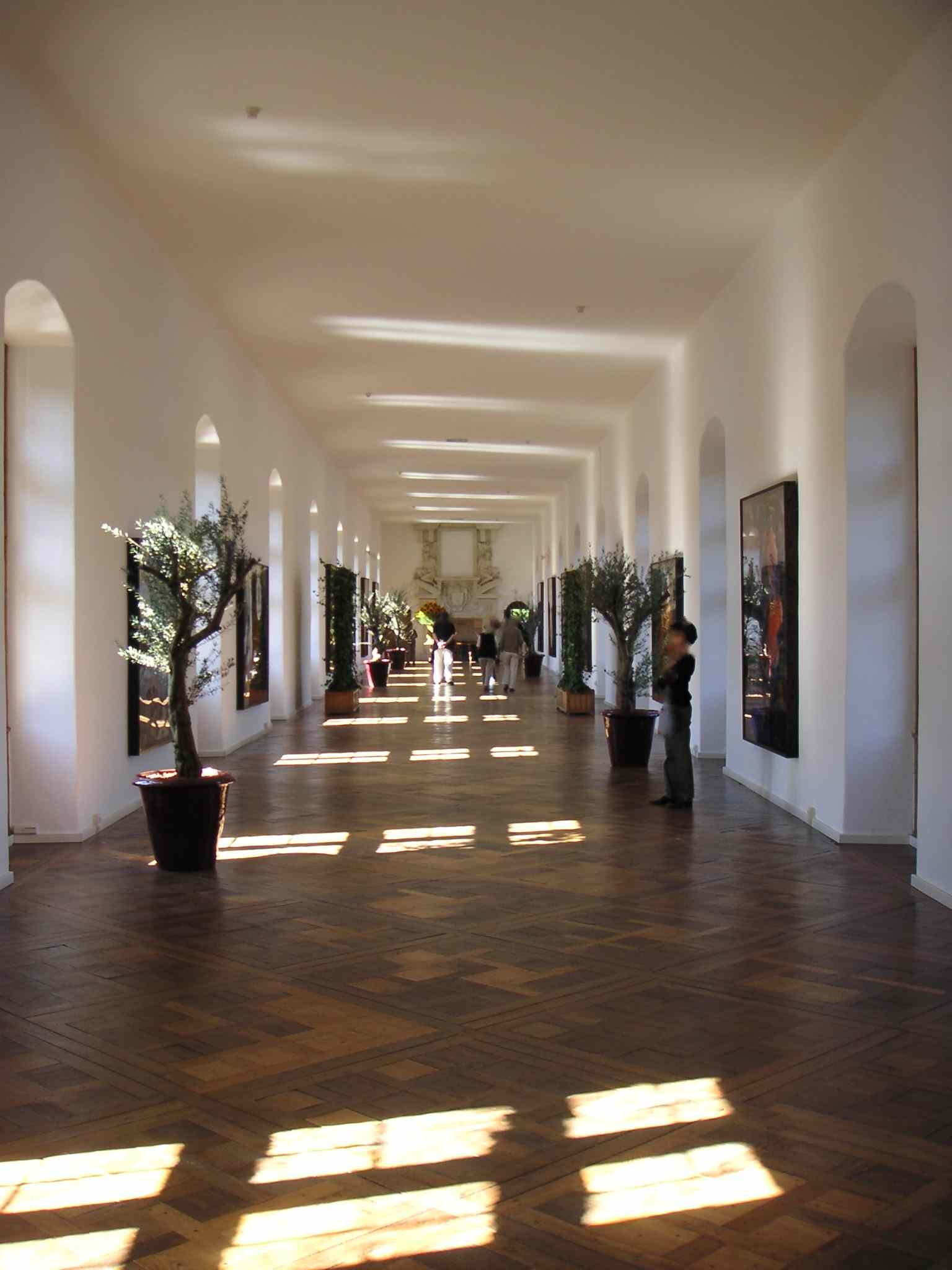 galerie du premier étage du château de chenonceau (France)